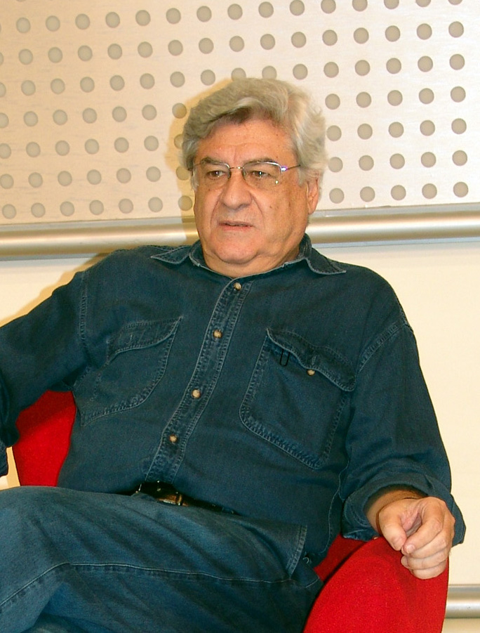 O escritor brasileiro de telenovelas Lauro César Muniz.Lauro Cesar Muniz "The Writer"